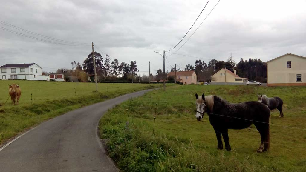 Vista de Taboada, Mandiá, Ferrol.